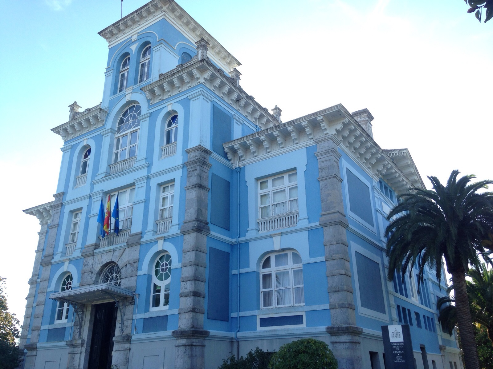 Fachada principal del archivo de indianos de colombres